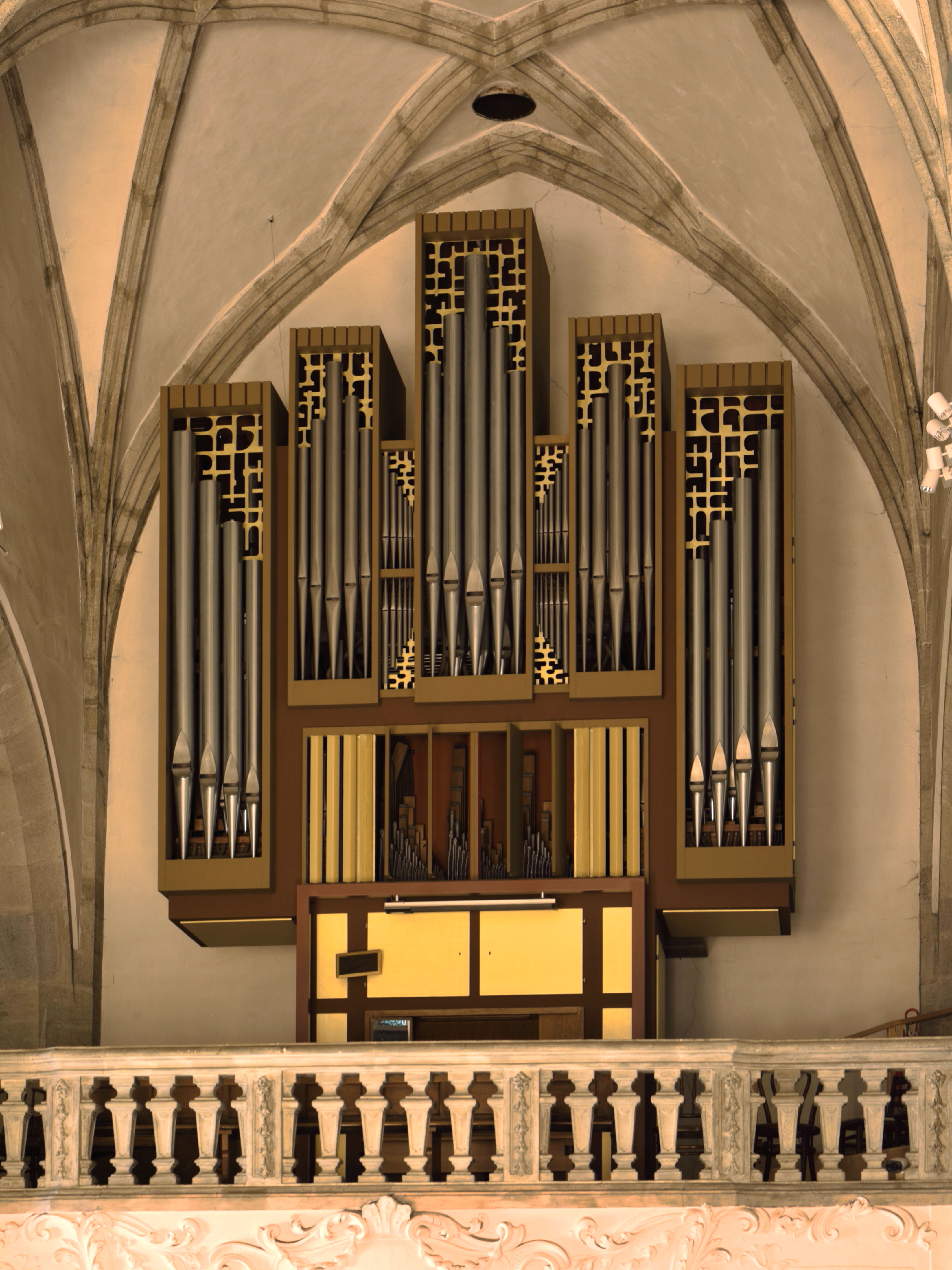 Orgel der Stadtpfarrkirche Mariä Himmelfahrt in der niederösterreichischen Stadtgemeinde Melk. Sie wurde 1969 vom Orgelbaumeister Gregor Hradetzky gebaut und hat 17 Register.